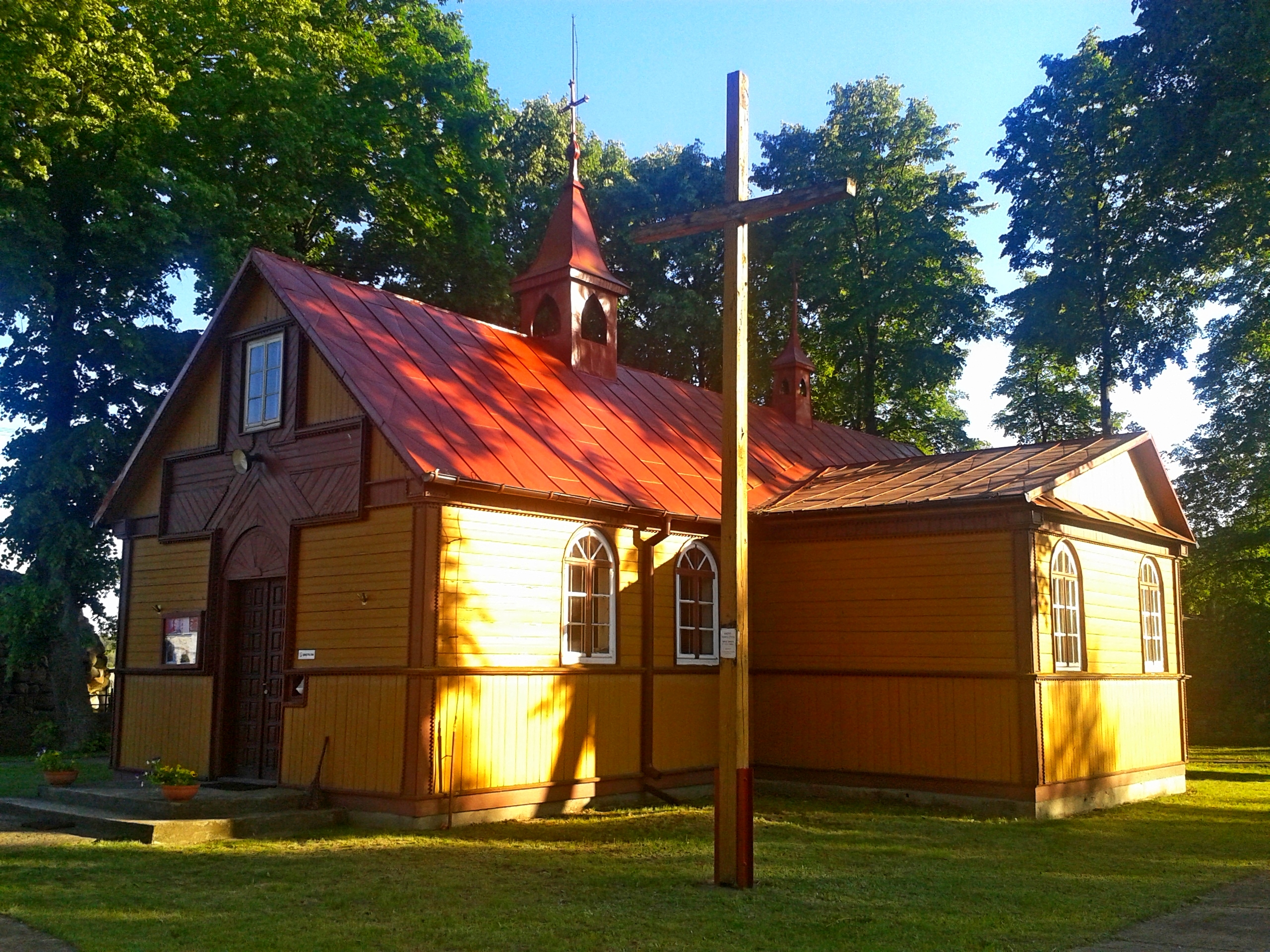 Kościół Matki Boskiej Anielskiej w Horoszkach Dużych